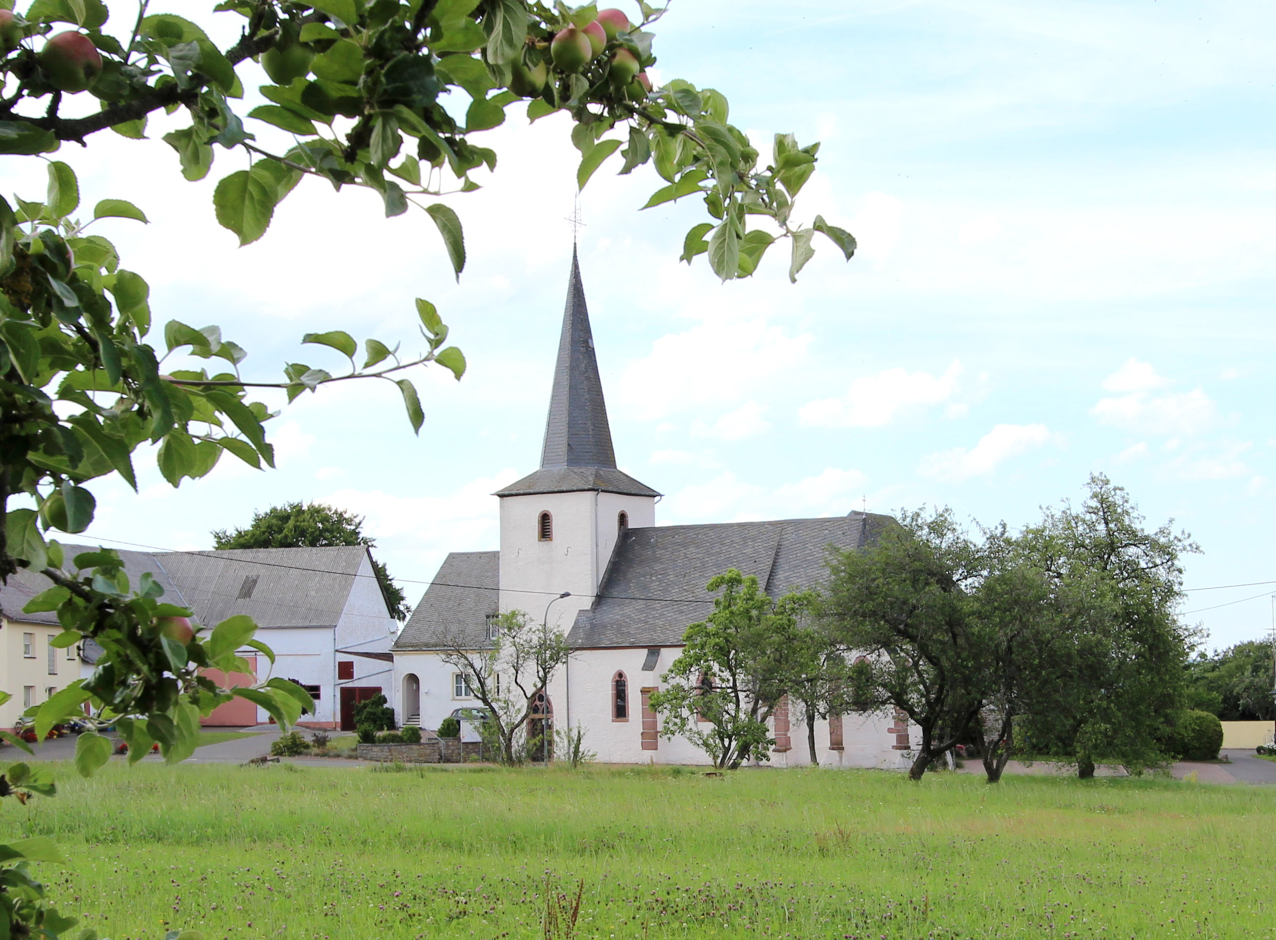 54597 Roth bei Prüm. Aufnahme von 2017.